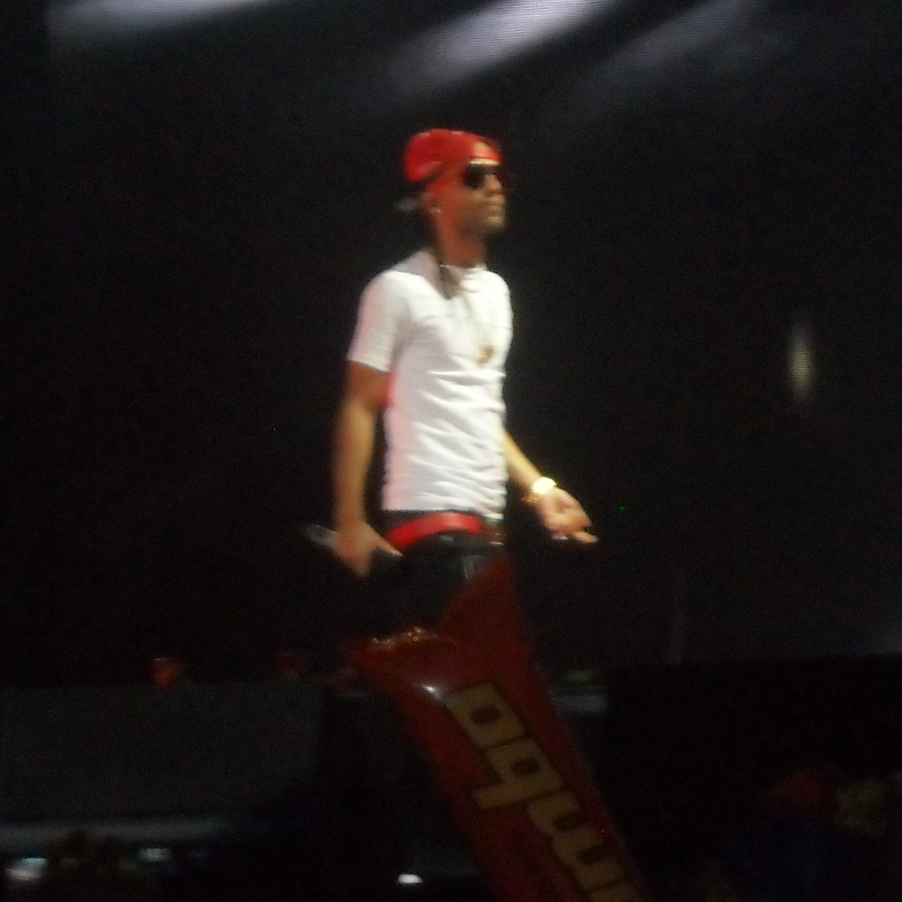 Arca en vivo.